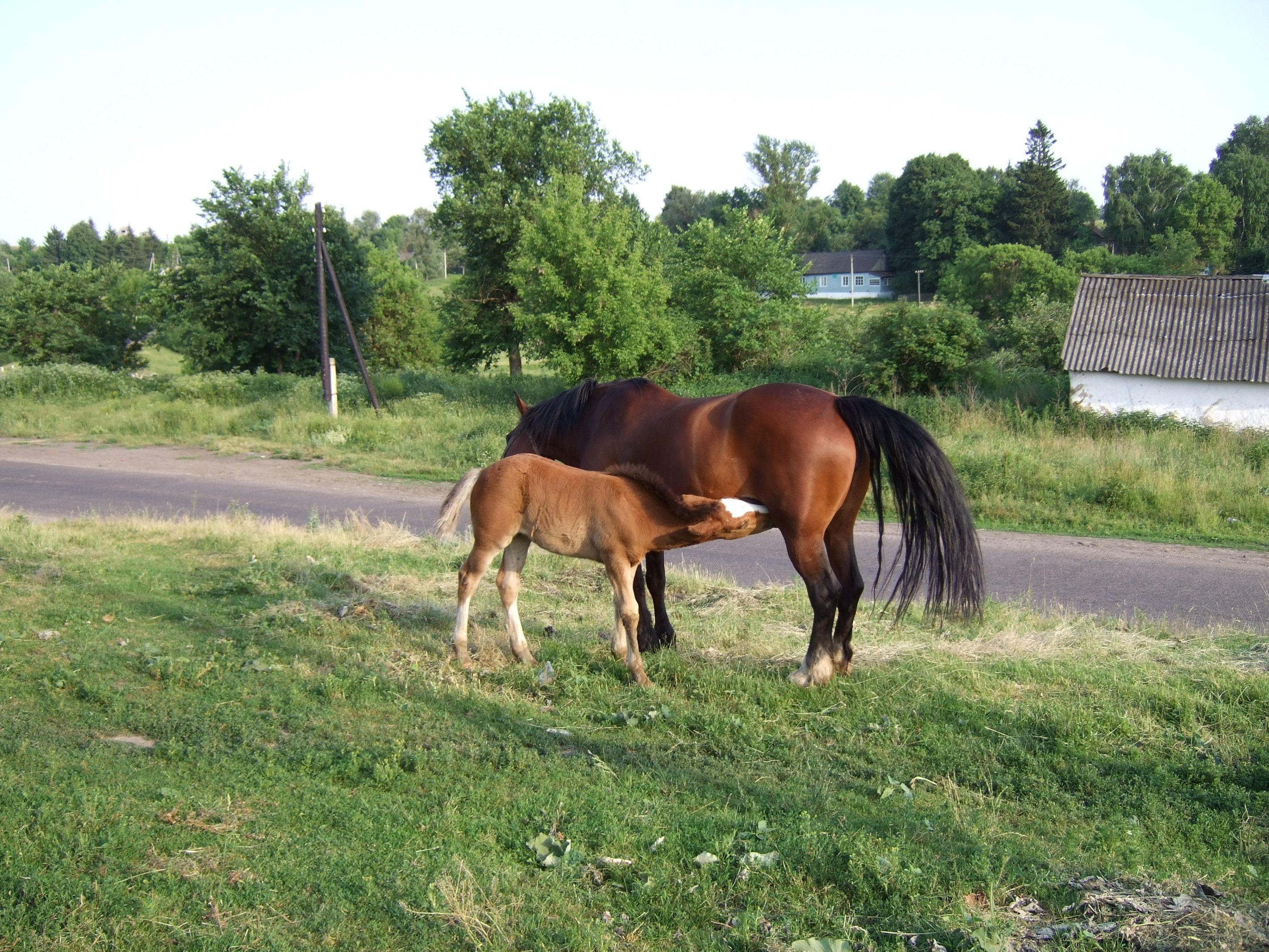 Вид на село .